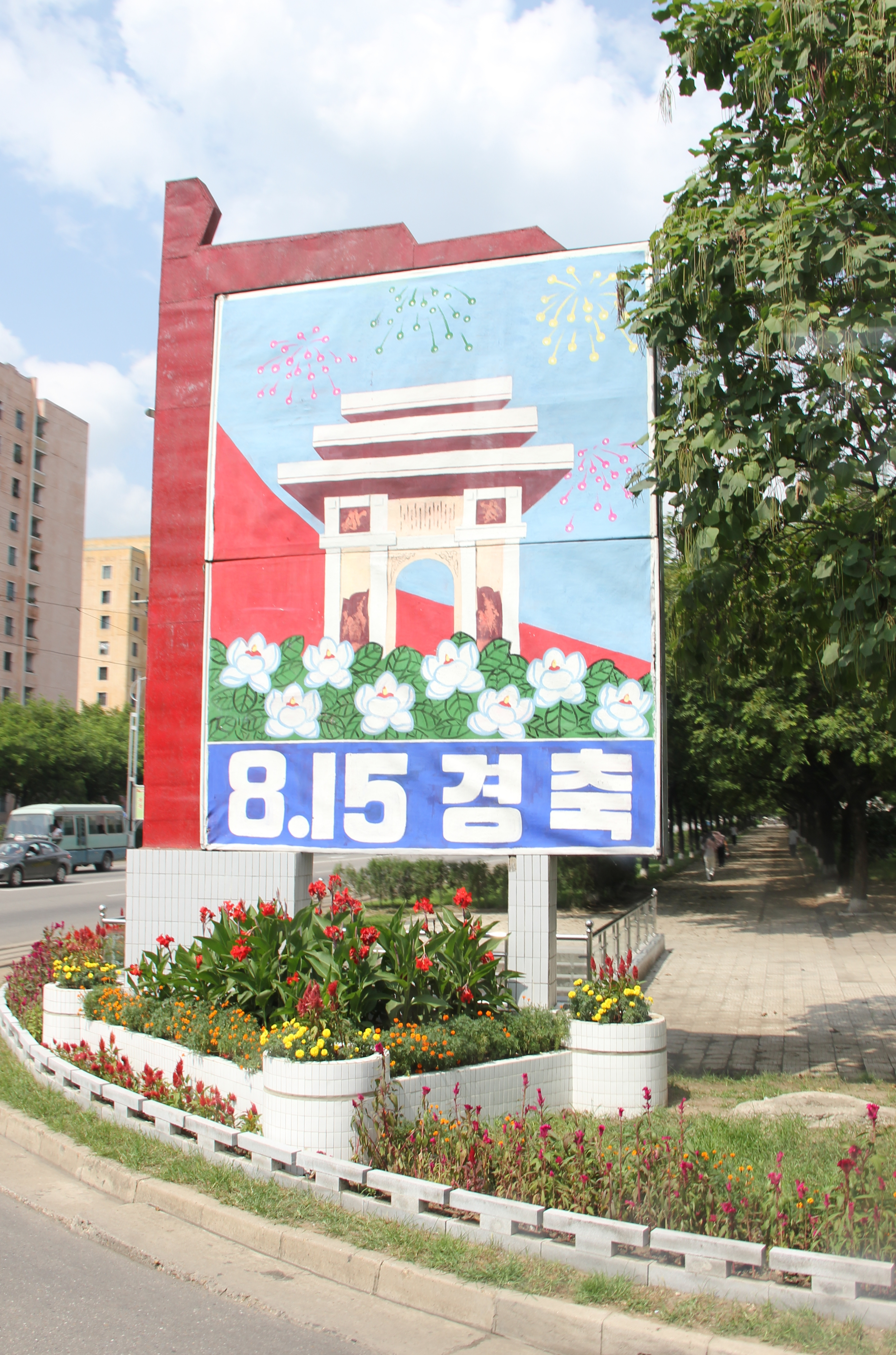 Pyongyang